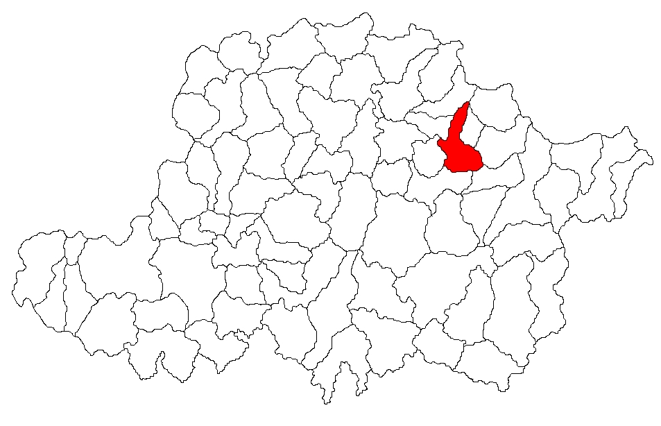 Categorie:Hărţi ale judeţului Arad